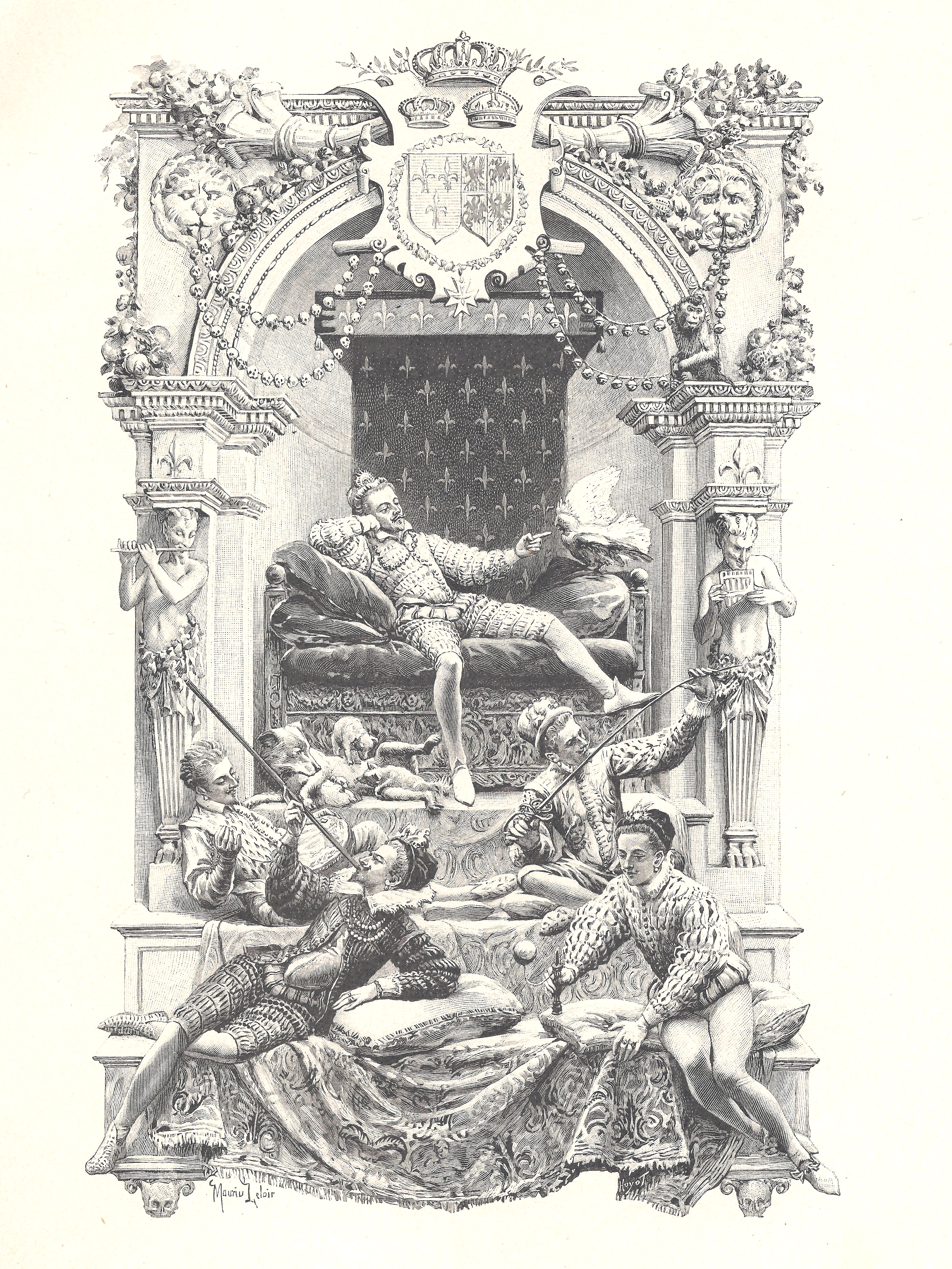 composition de Maurice Leloir et gravure sur bois de Jules Huyot se trouvant p. V : Frontispice : le roi très chrétien Henri III et ses amis.